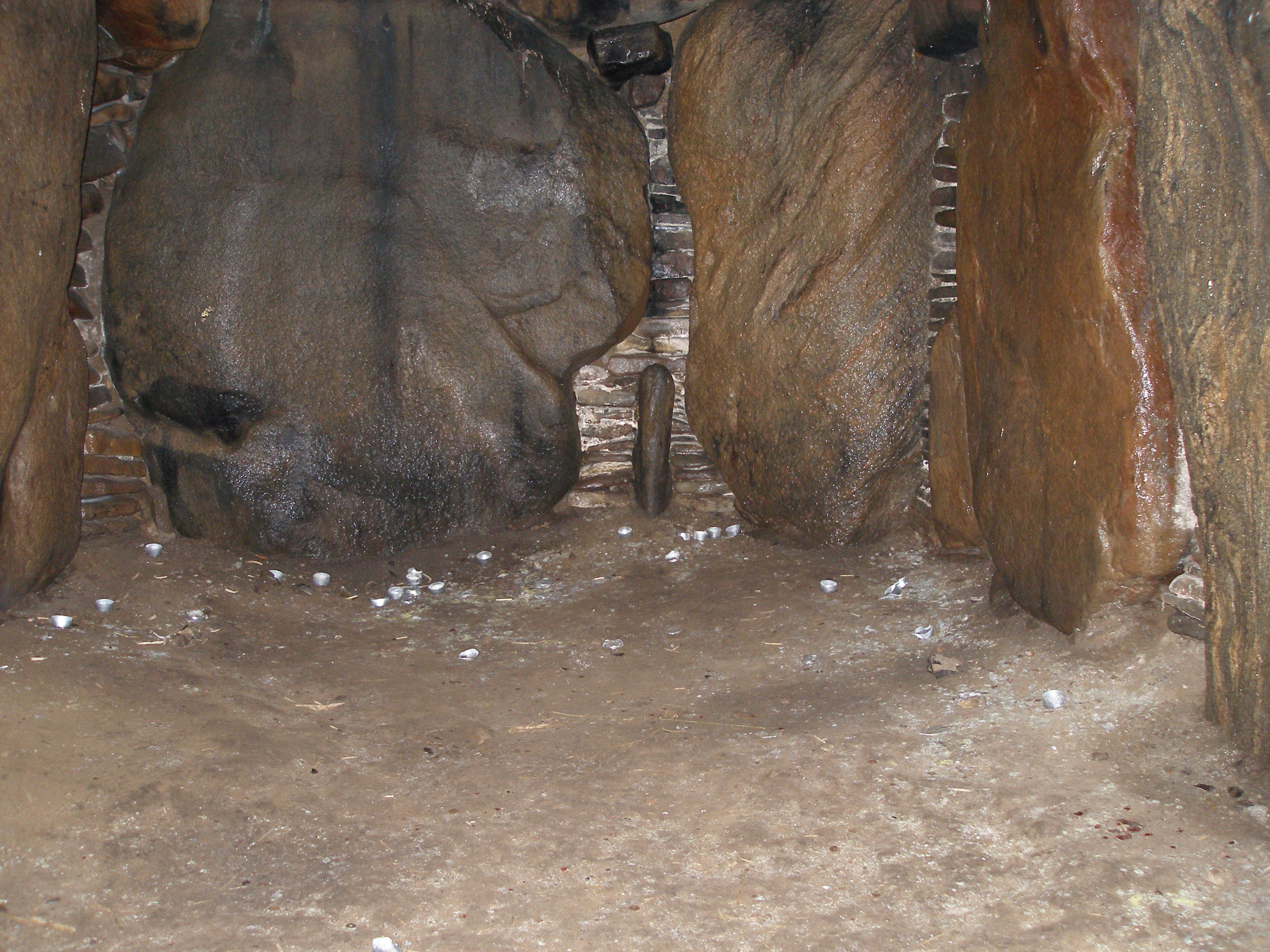 Mårup Jættestue, Hindsholm, Fyn